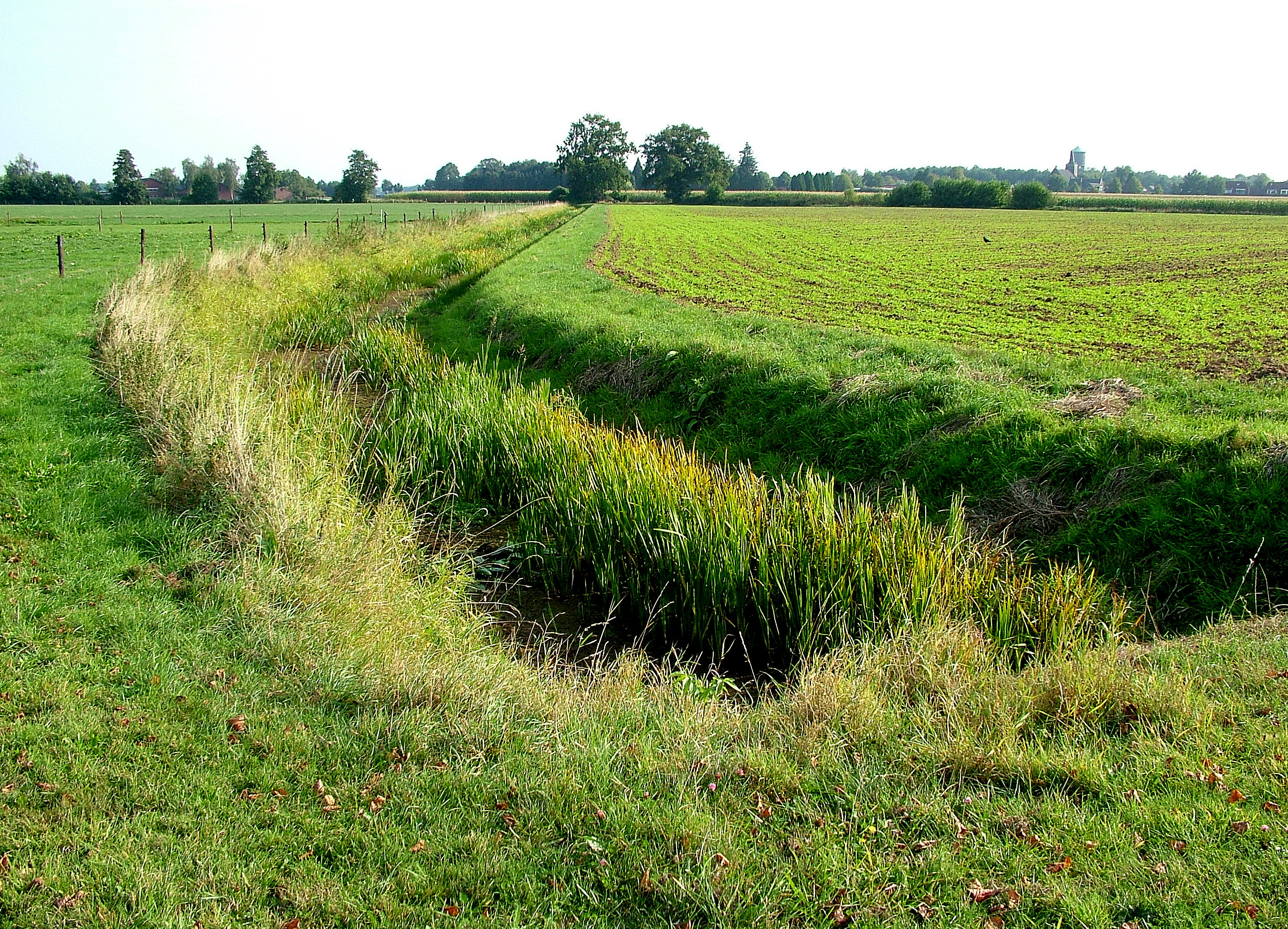 Oude IJsselstreek, beek bij Lange Dijk (gaat naar de Oude IJssel)